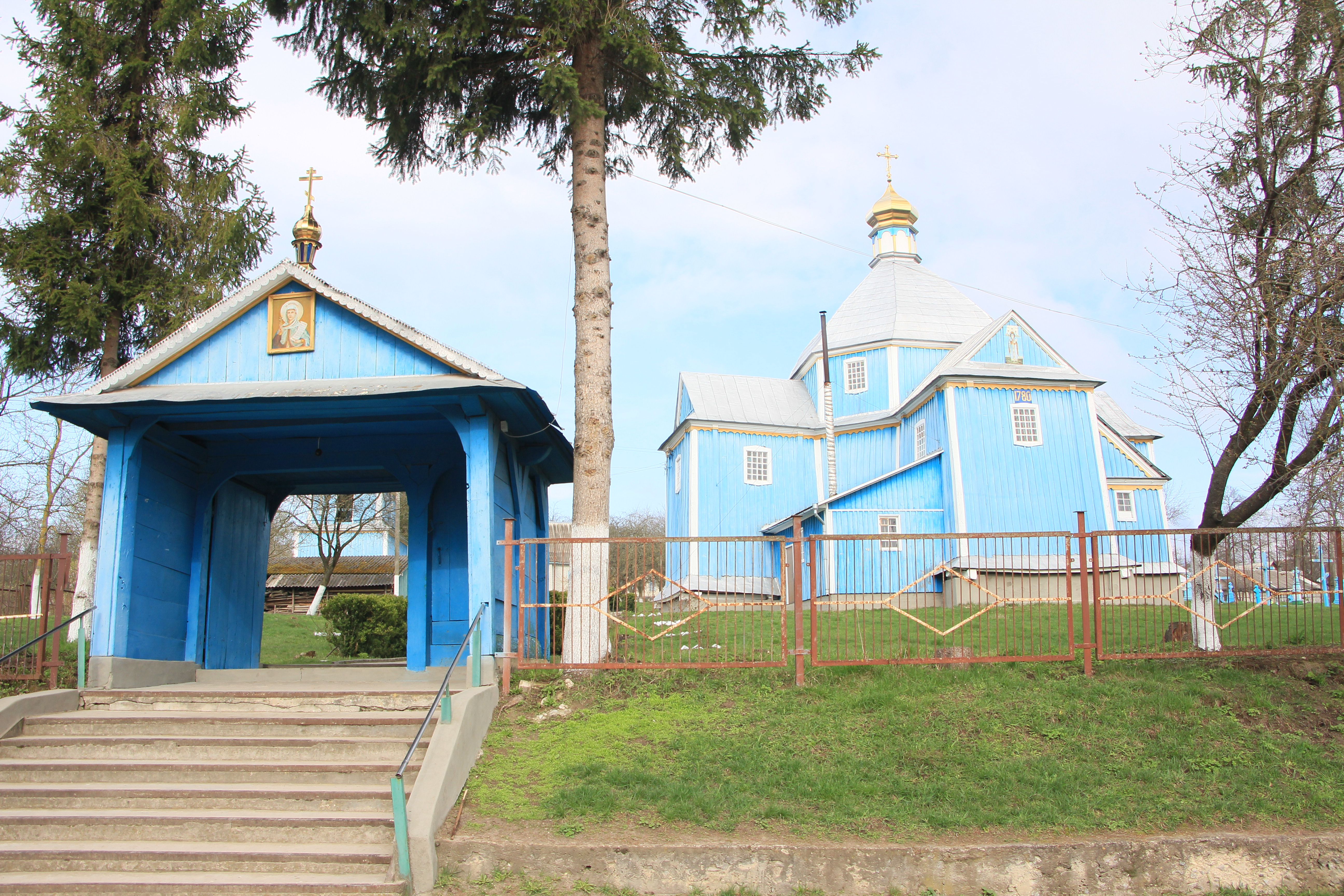 Дерев'яна церква в селі Ридомиль Кременецького району Тернопільської області